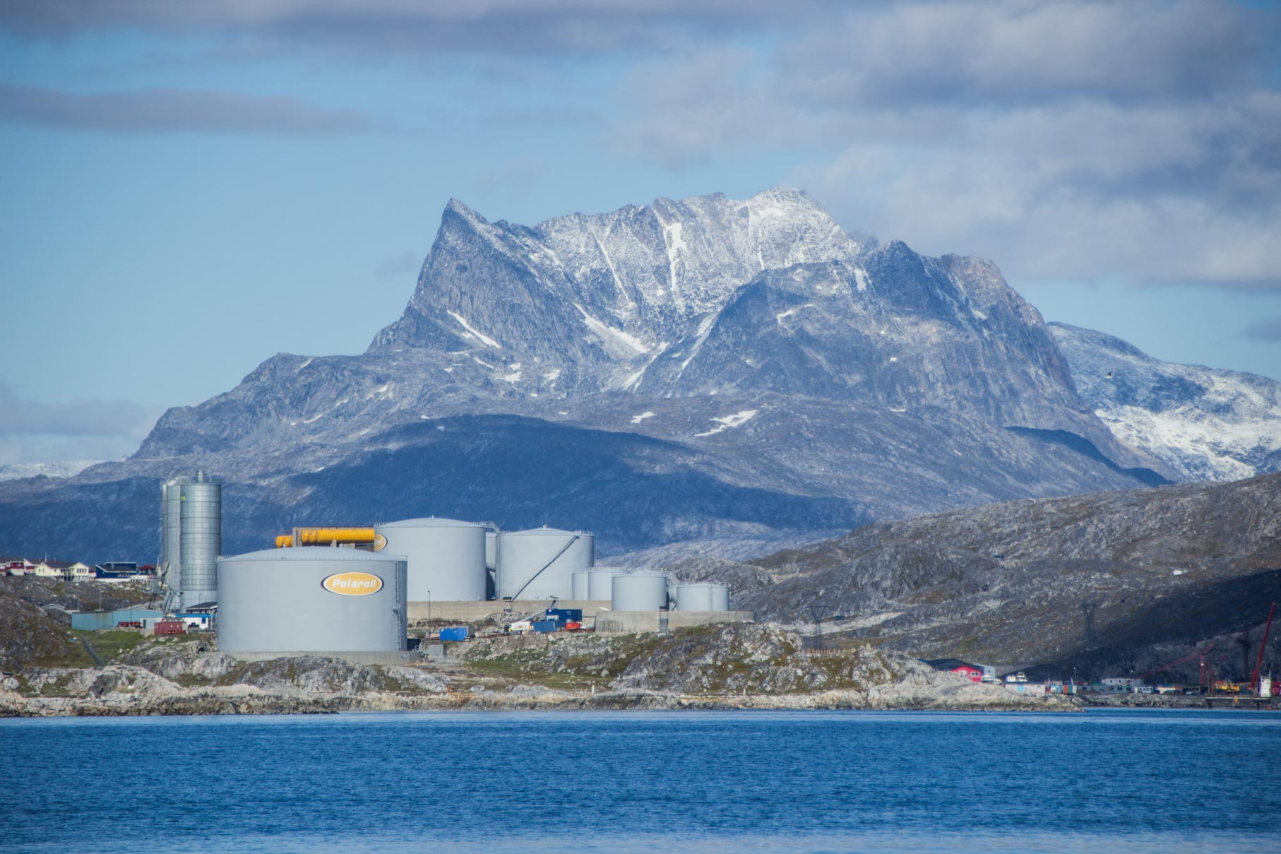 Tankanlæg